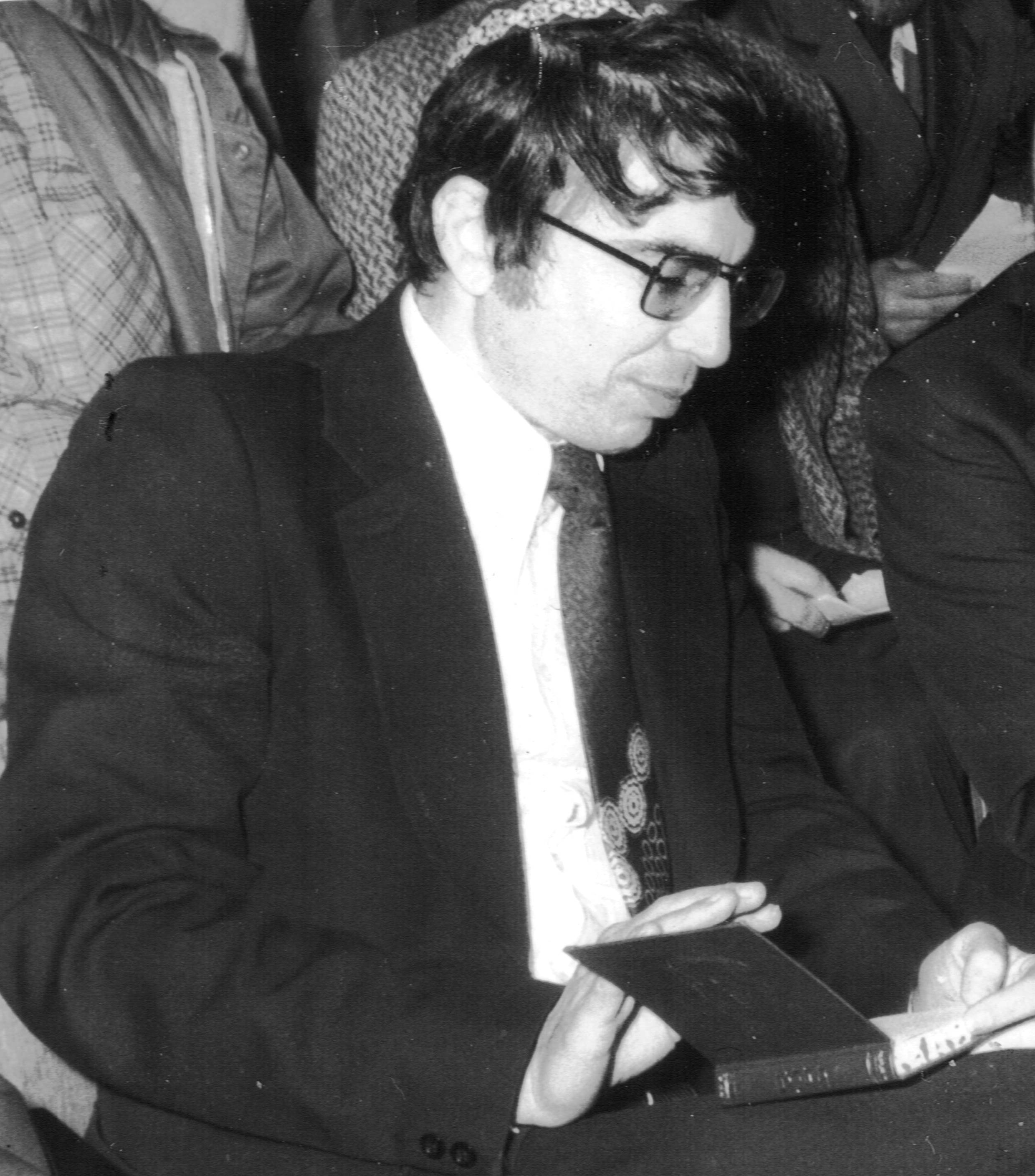 אהרן אבו חצירא בנשר 2 בביקור בנשר ב-2 בינואר 1978 - ארכיון עיריית נשר צלם שטרסברג